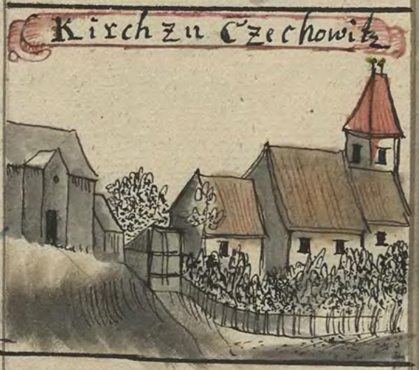 Kirche in Schechowitz